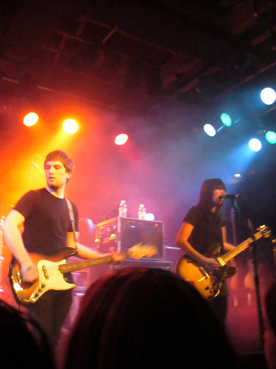 3/15/07 Meg & Dia @ Slim's